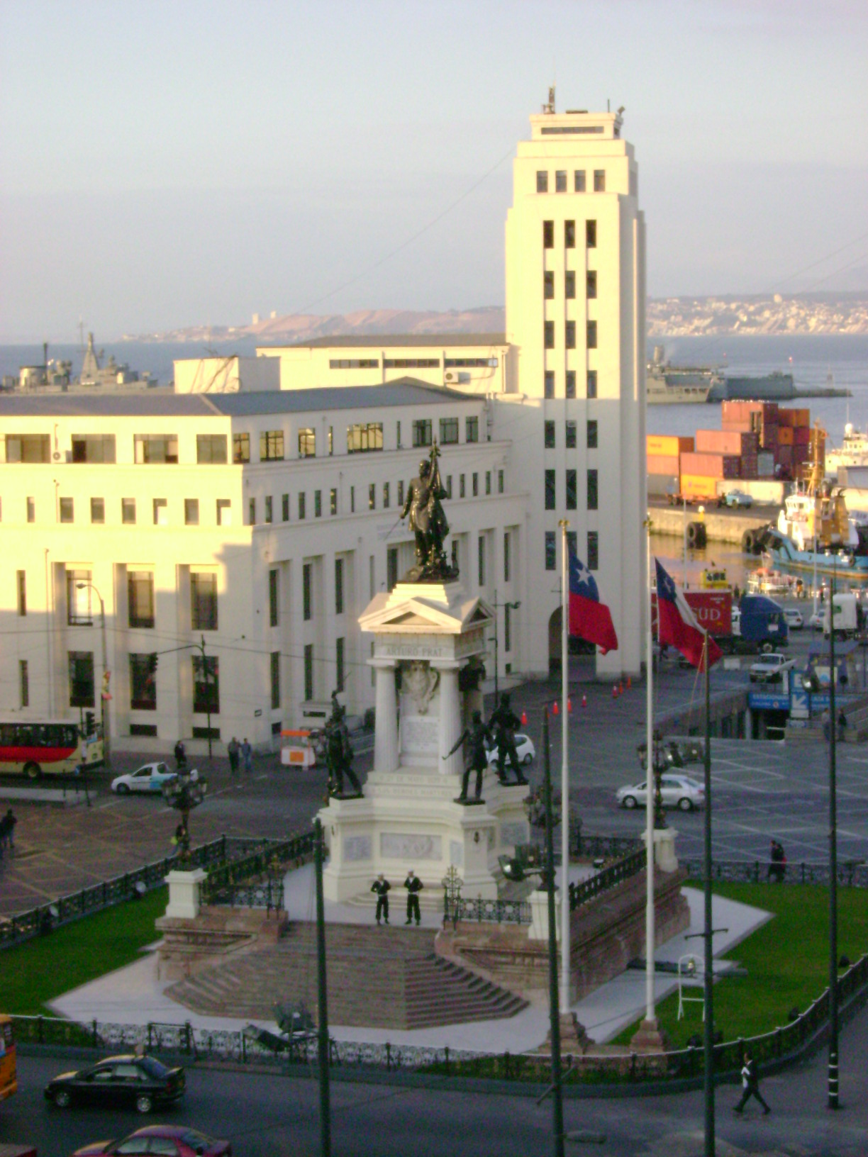 valparaiso